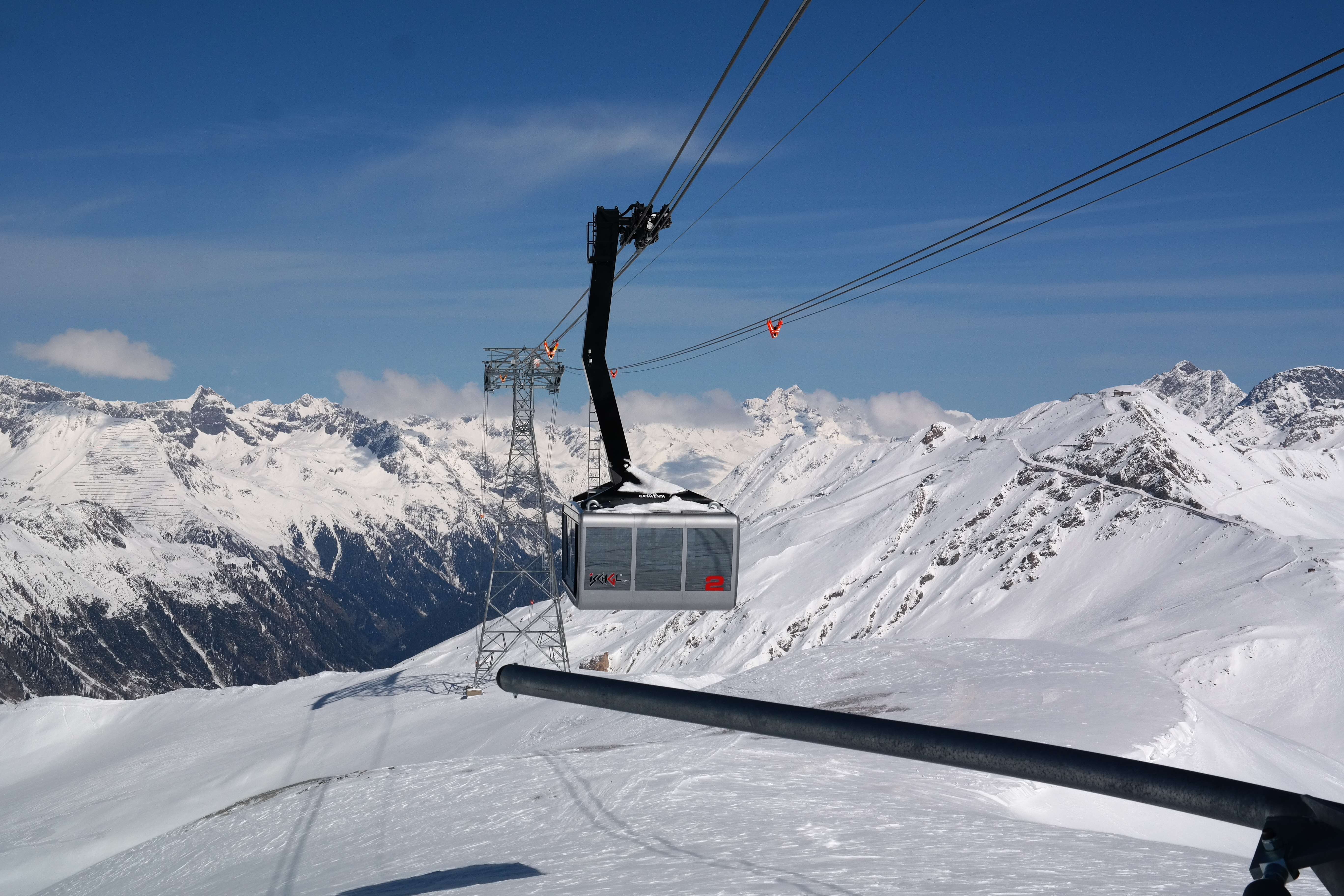 Piz Val Gronda Bahn